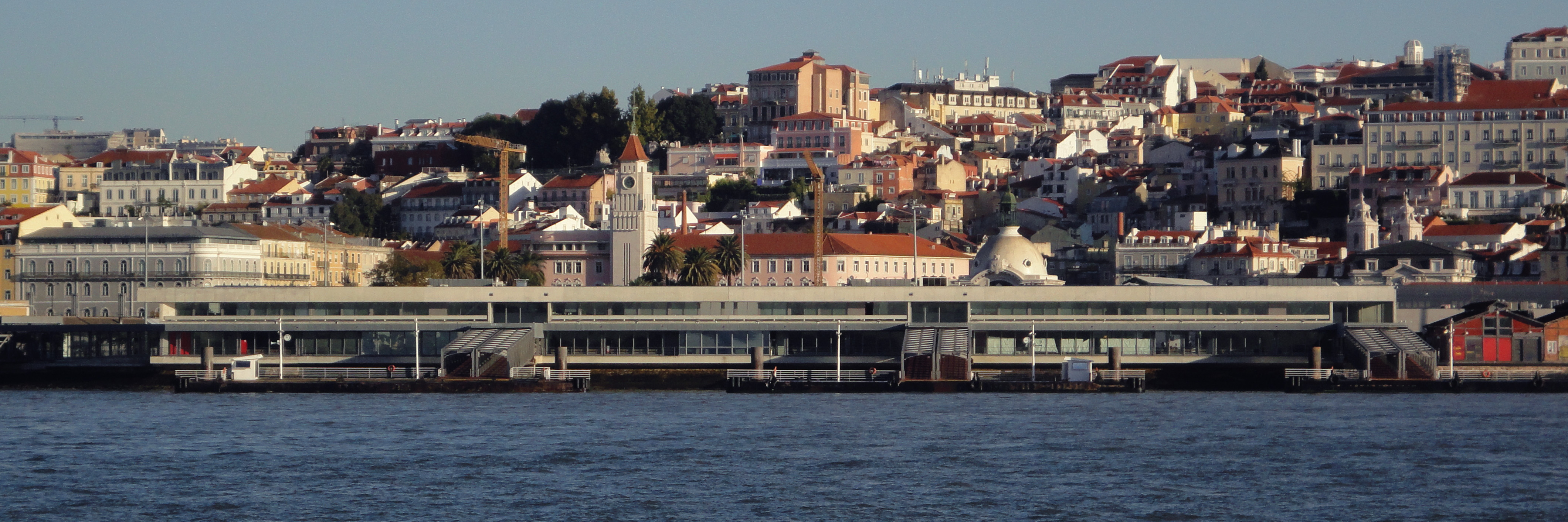 Terminal Fluvial, Cais do Sodré, Lisboa (Arquitetura: Pedro Botelho)